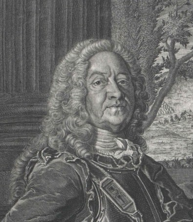 Porträt Hans Friedrich Freiherr von Sandrassky [Sandreczky] und Sandraschütz (* 19. September 1668 - † 21. März 1737), Erbherr der Güter Niederlangenseifersdorff, Schwentnig, Kleinkniegnitz und Prschidrowitz, Landesältester der Fürstentümer Schweidnitz und Jauer